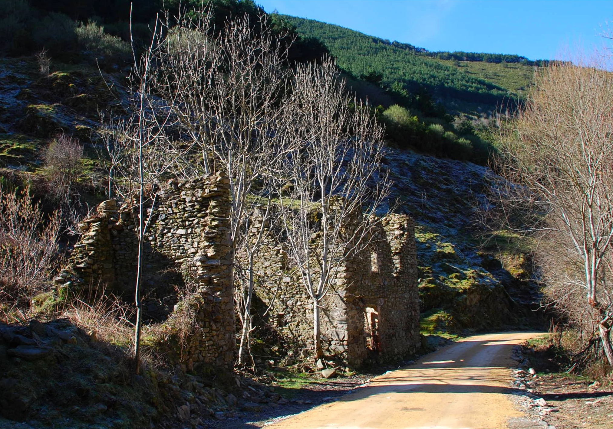 Aldea de Altuzarra